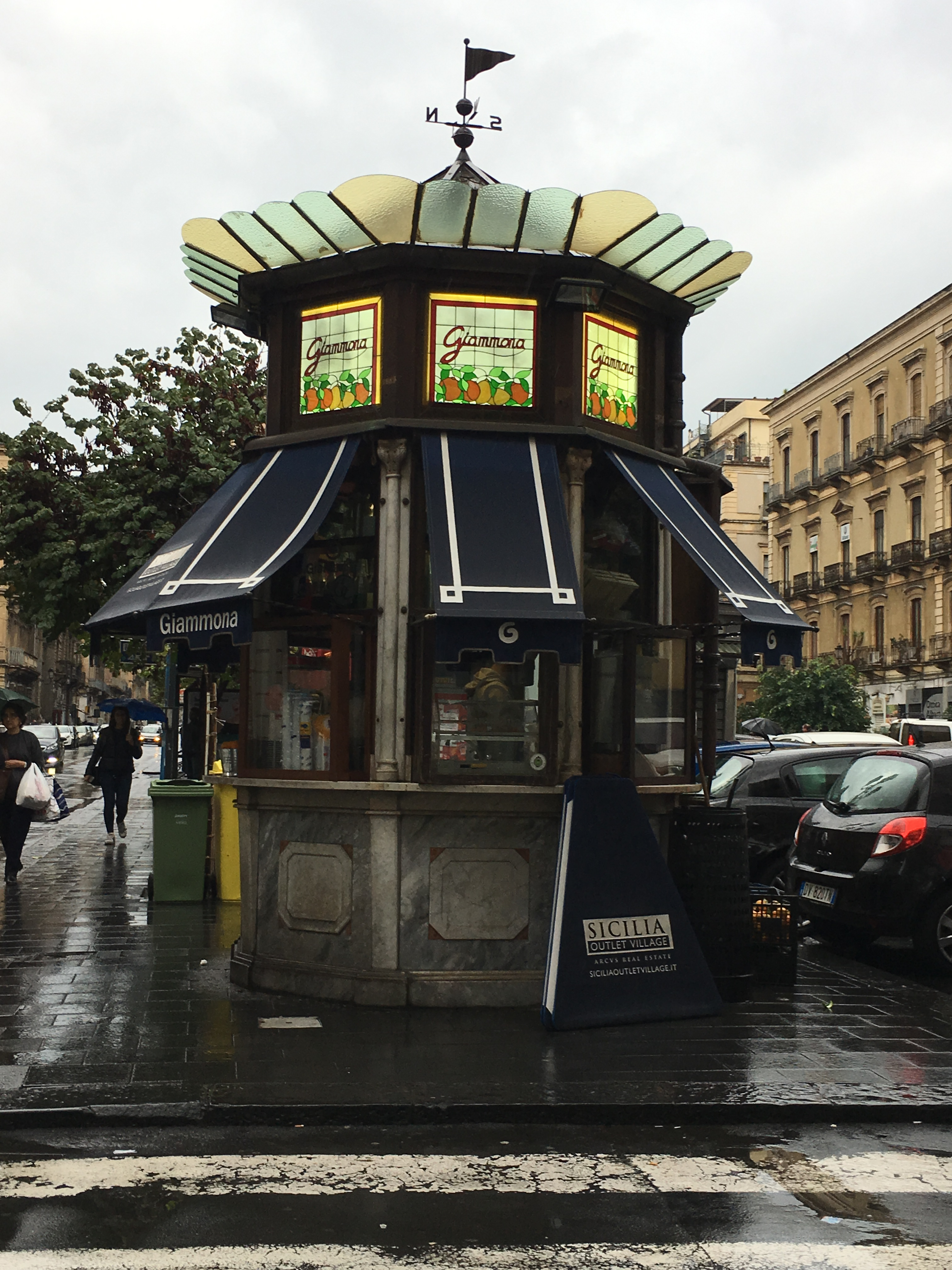 Il chiosco Giammona in via Umberto I a Catania